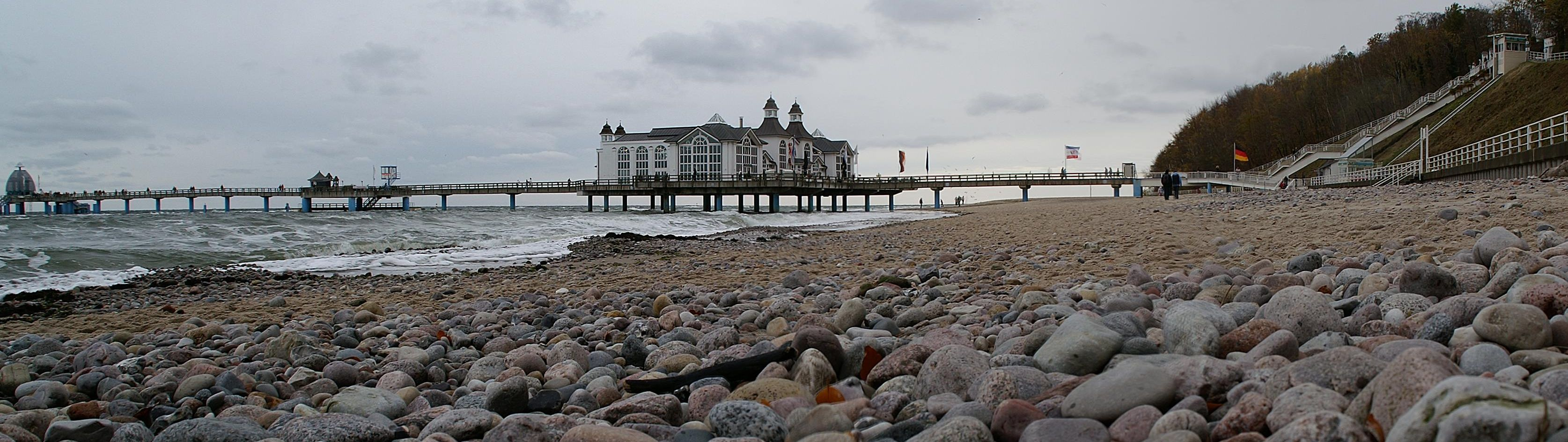 Seebrücke Sellin auf Rügen